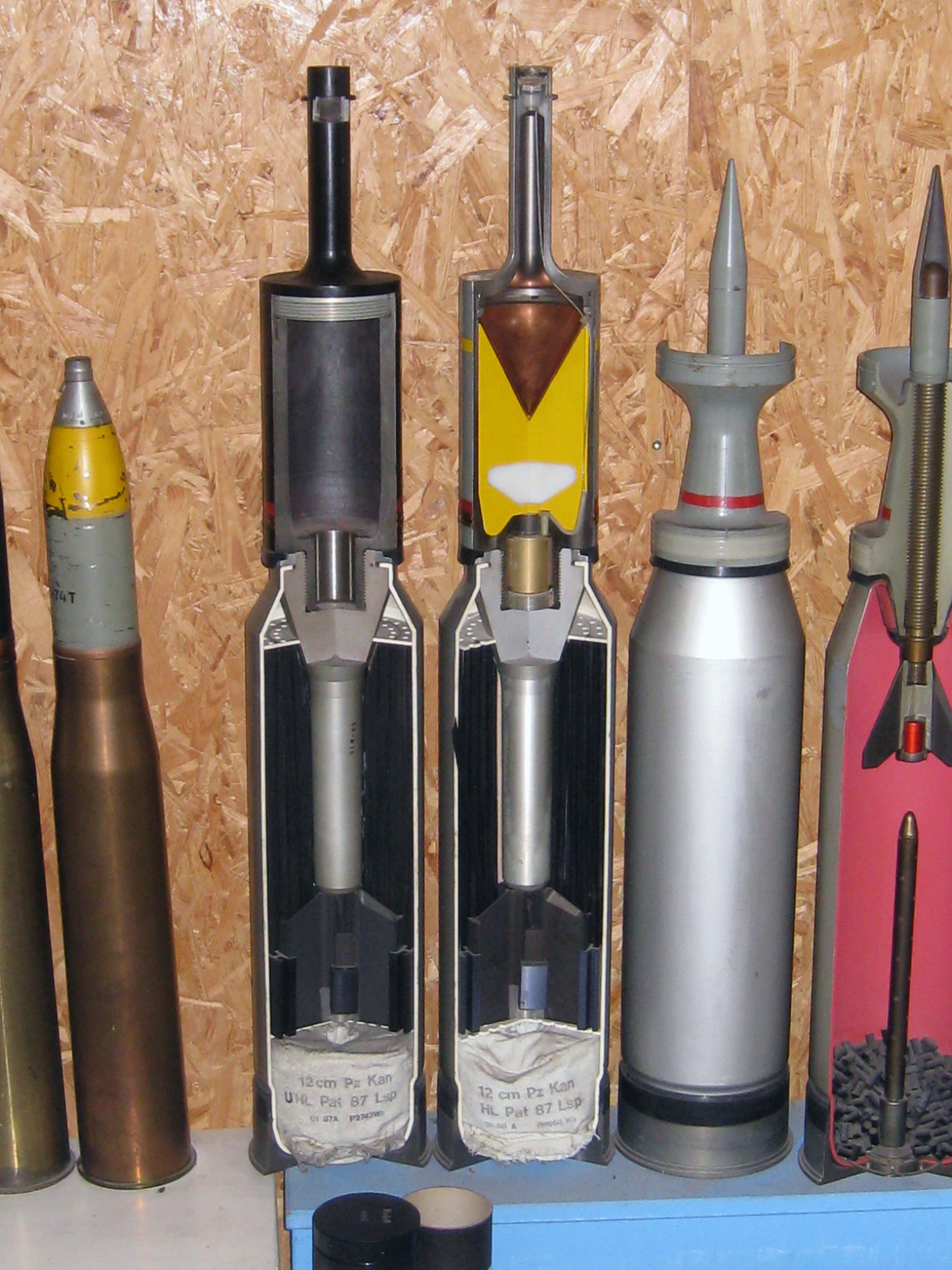 Schnittmodelle Panzermunition Leo 2 im Militärmuseum Full